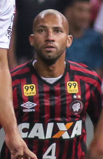 Estádio Nacional de Brasília Mané Garrincha, Brasília, DF, Brasil, 30/9/2015 Foto: Andre Borges/Agência Brasília O duelo entre Brasília e Atlético Paranaense terminou com empate por 0 a 0 pela primeira fase da Copa Sul-Americana de futebol. Com esse placar, o time paranaense avança para a próxima fase da competição, enquanto o Brasília encerra sua participação no campeonato.